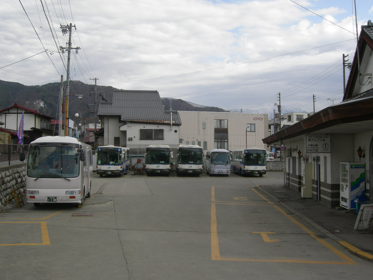 JRバス関東高遠駅（JR bus kanto,Takato station）